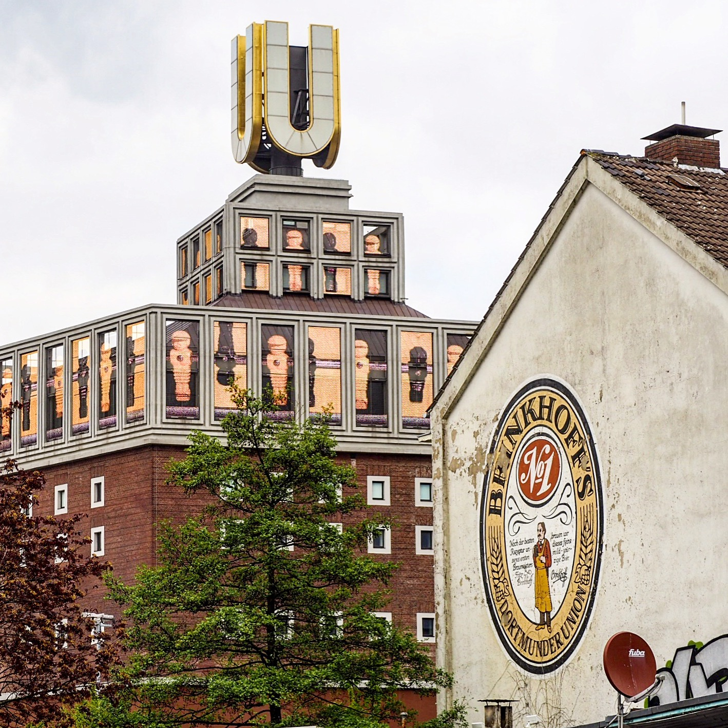 Dortmunder Unionbrauerei